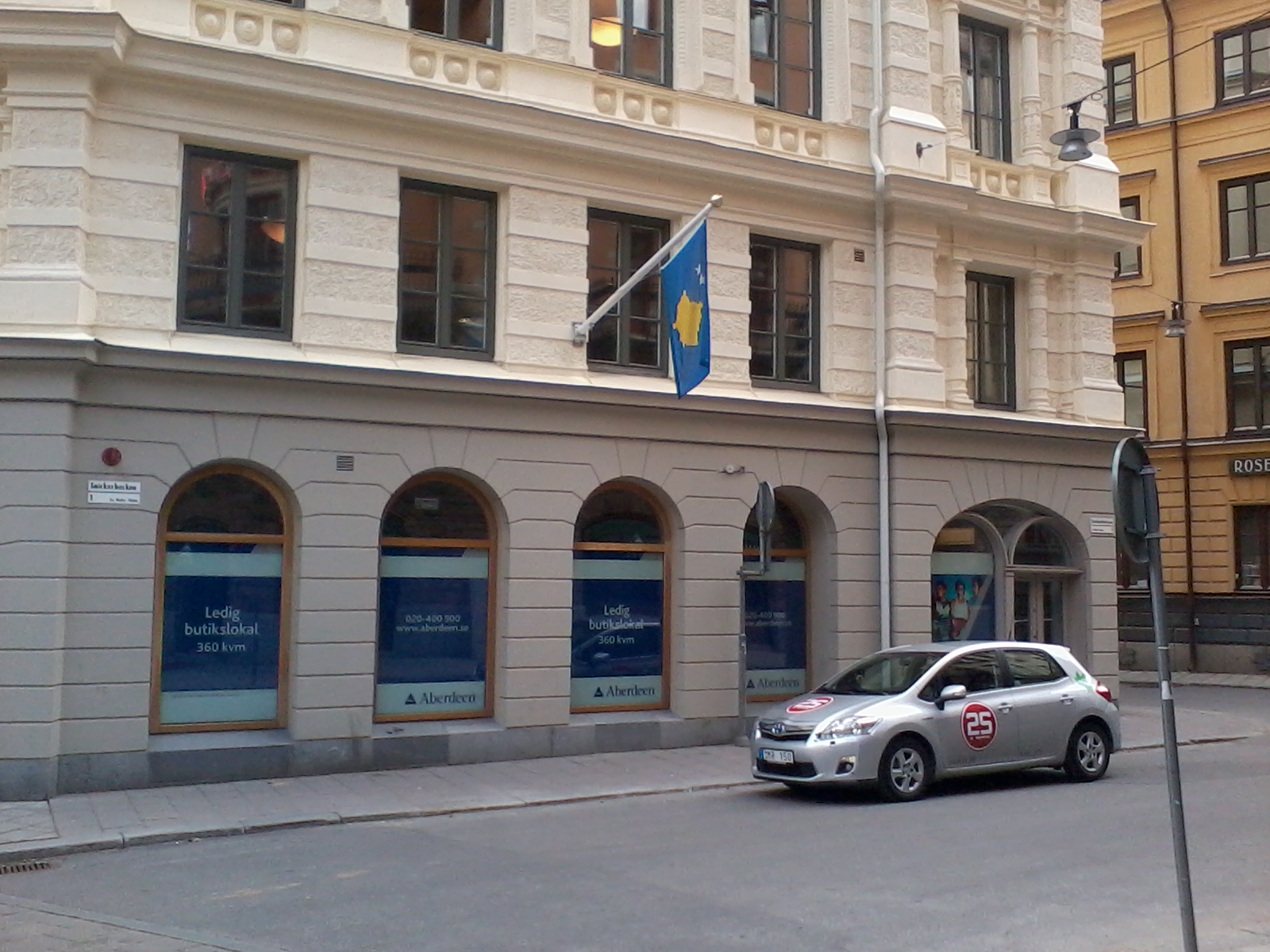 Kosovos ambassad i Stockholm